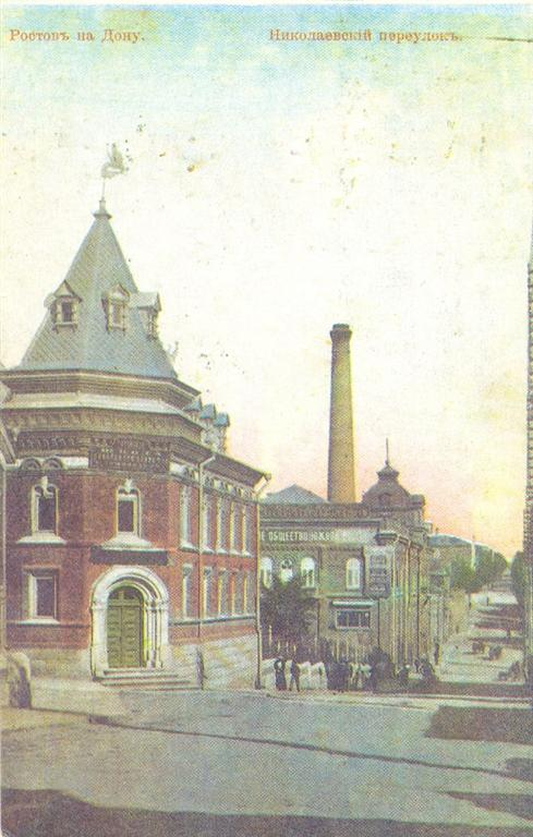 Здание школы домоводства и кулинарии в Ростове-на-Дону на дореволюционной открытке